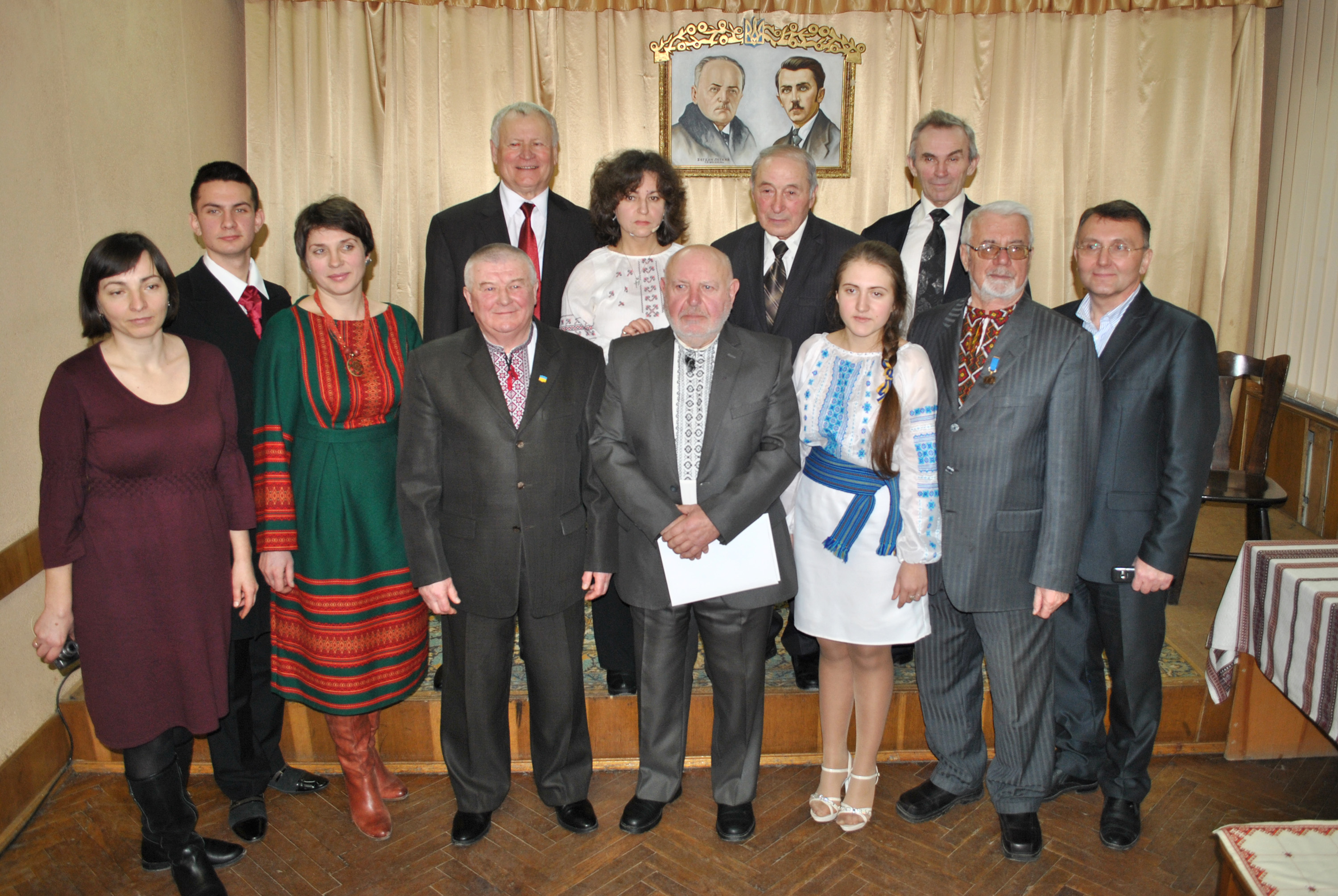 Лауреати премії імені Братів Богдана та Левка Лепких Тернопільської обласної школи мистецтв (директор Остап Гайдукевич), Оксана Ваврик, Богдан Ничик, Іван Максимів (задній ряд) з побратимами по культурно-мистецькому цеху.